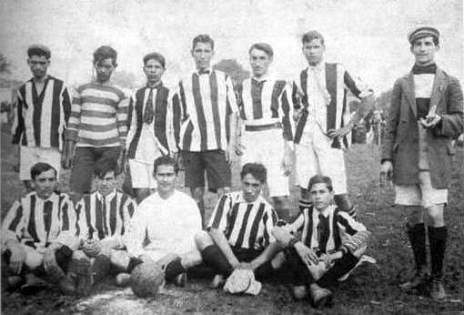 Club Libertad Campeón de la Liga Paraguaya.